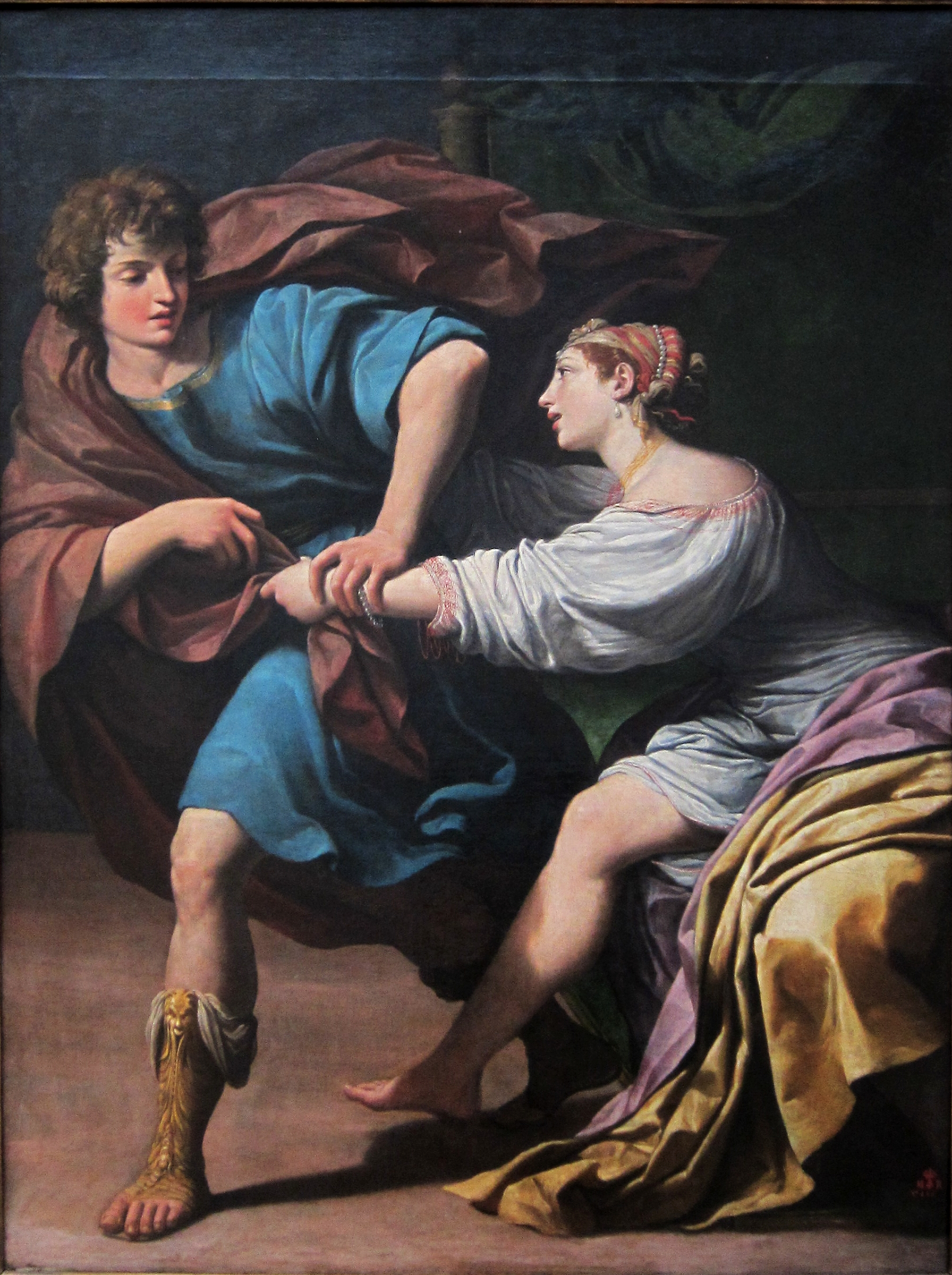 Joseph et la femme de Putiphartitle QS:P1476,fr:"Joseph et la femme de Putiphar" label QS:Lfr,"Joseph et la femme de Putiphar"